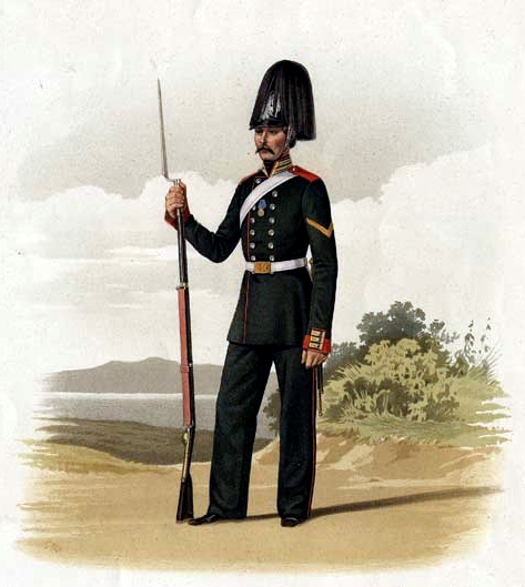 Рядовой Л.-Гв. Гарнизонного батальона, 21 мая 1860. (В парадной форме).